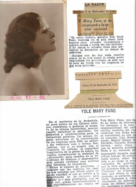 L'attrice ed imprenditrice italo-cilena Jole Fano